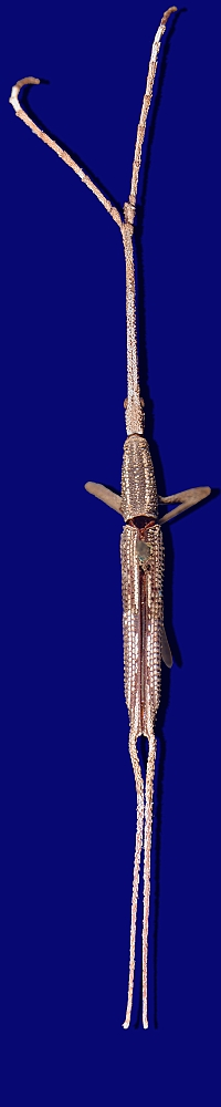 Diurus completus, collection Museum Wiesbaden